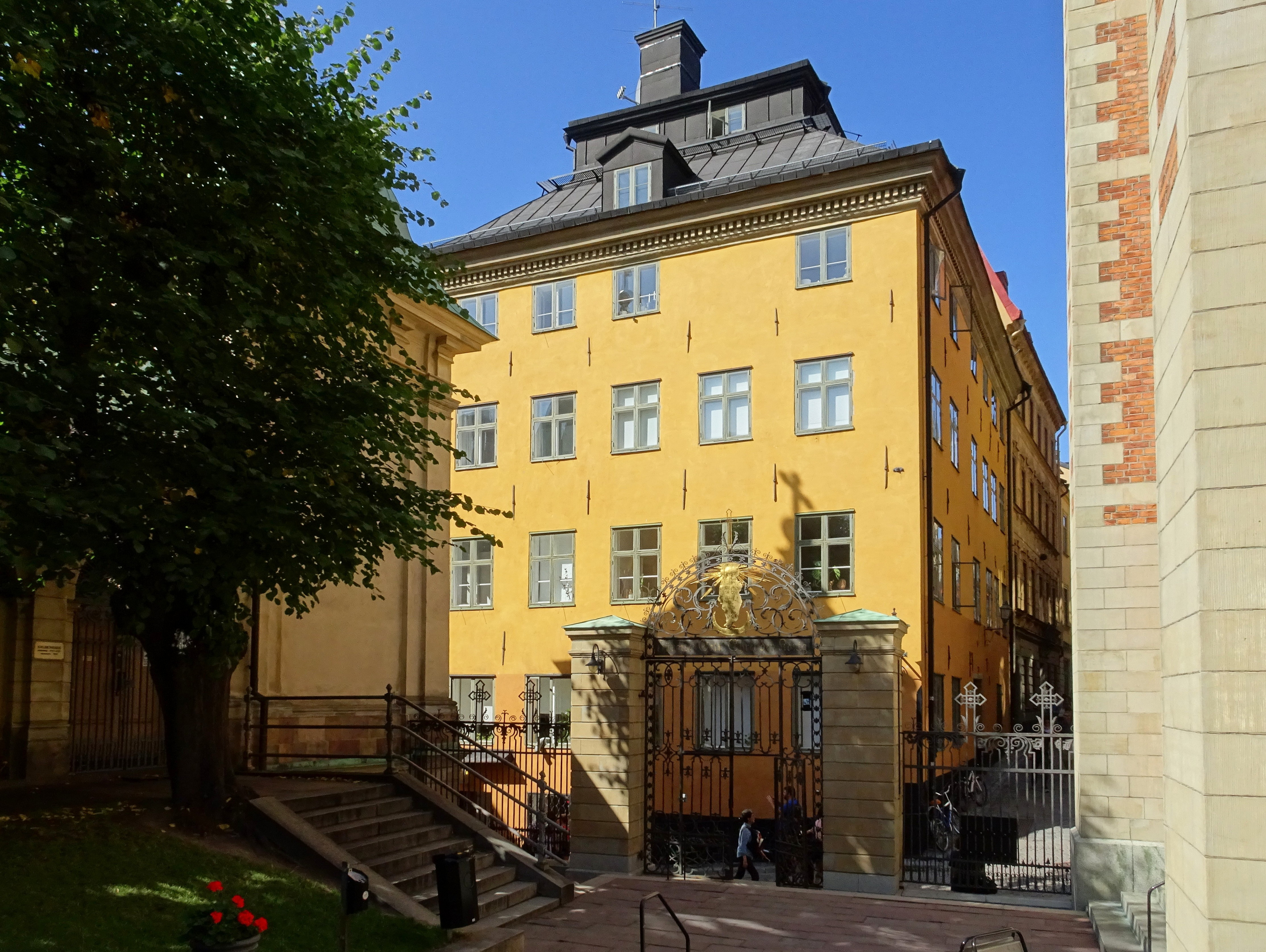 Fastigheten Atlas 8 vid Tyska Brinken, tidigare plats för den kända krogen "Förgyllda Lejonet"